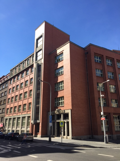 Česká akademie zemědělských věd - sídlo